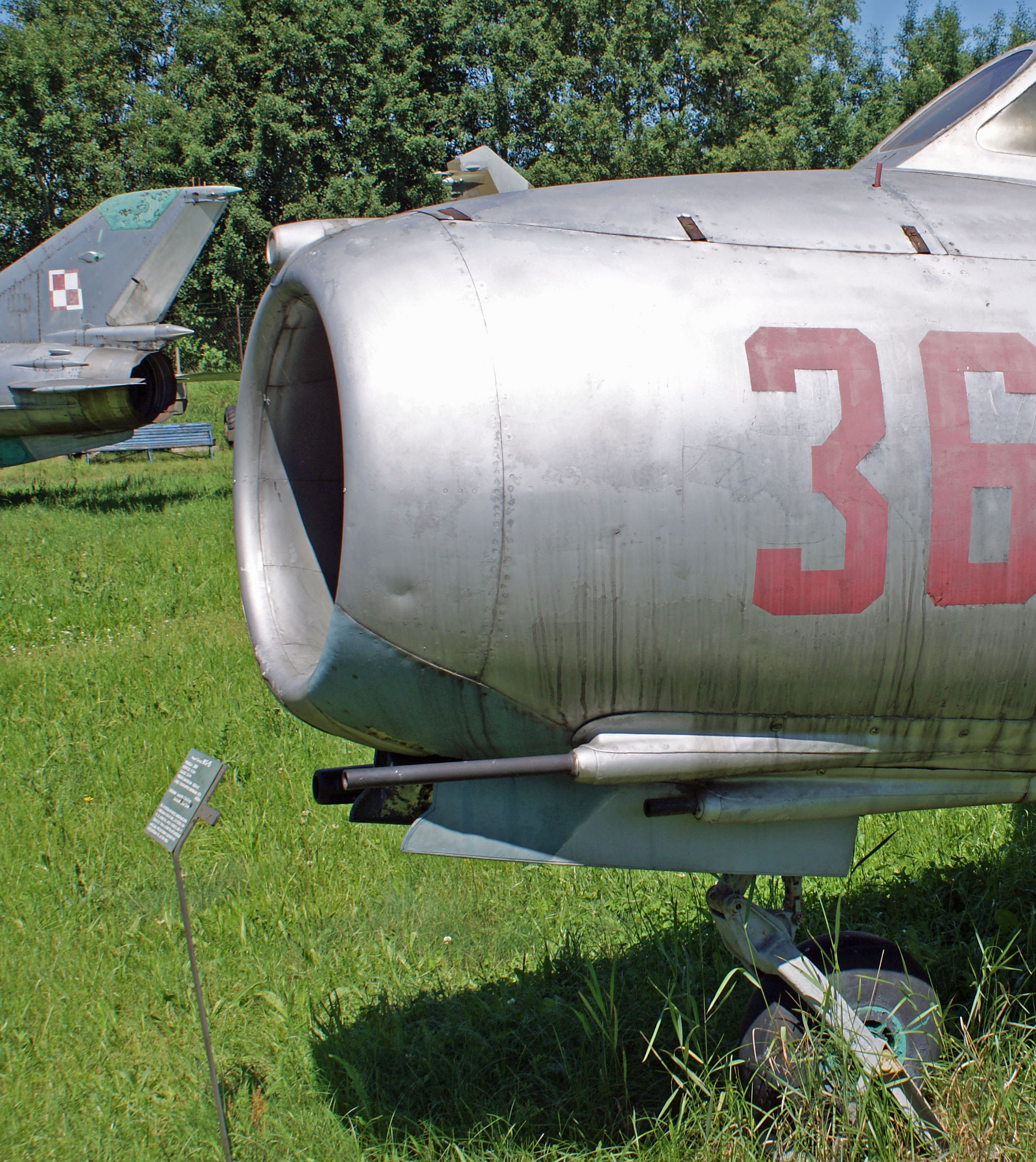 Samolot MiG-15 (numer boczny 365) wyposażony w działka: 2xNS-23 (prawa strona) i NS-37 (lewa strona). Ten egzemplarz był eksploatowany do roku 1964. Muzeum Polskiej Techniki Wojskowej w Warszawie